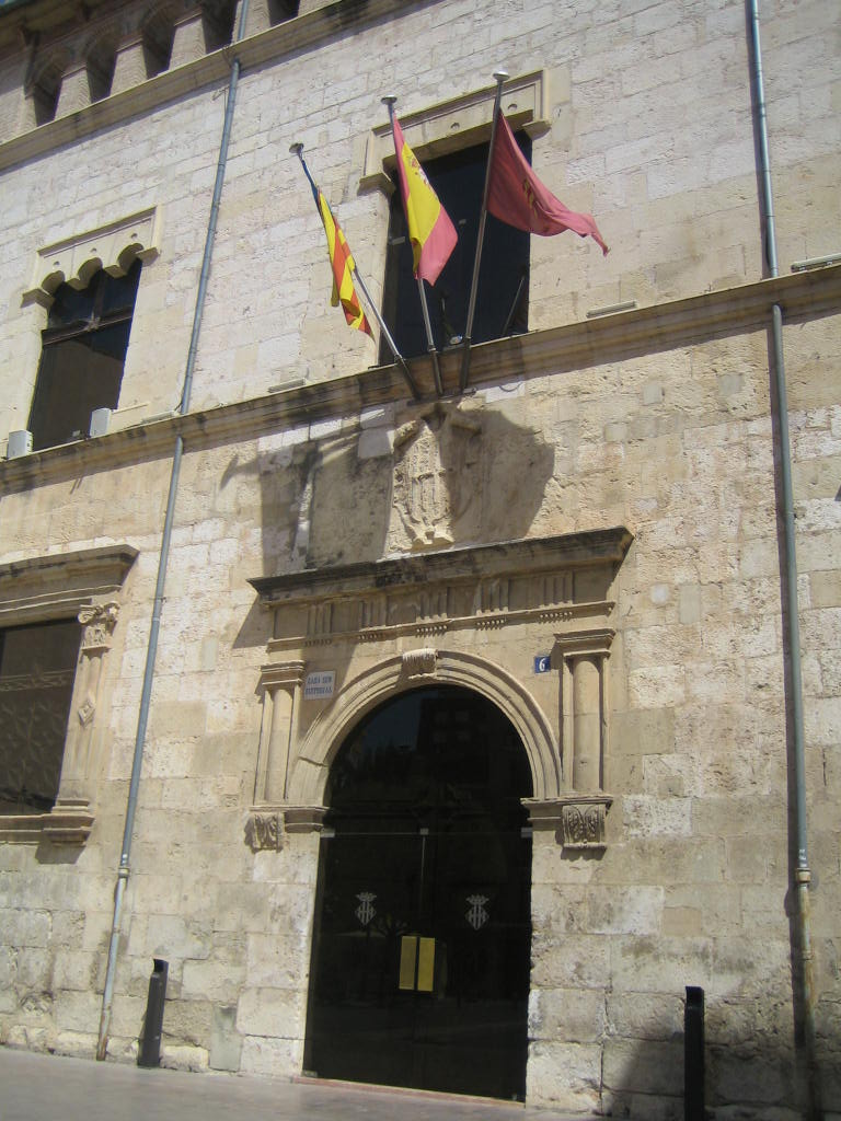 Fachada del Ayuntamiento de Alzira (España).